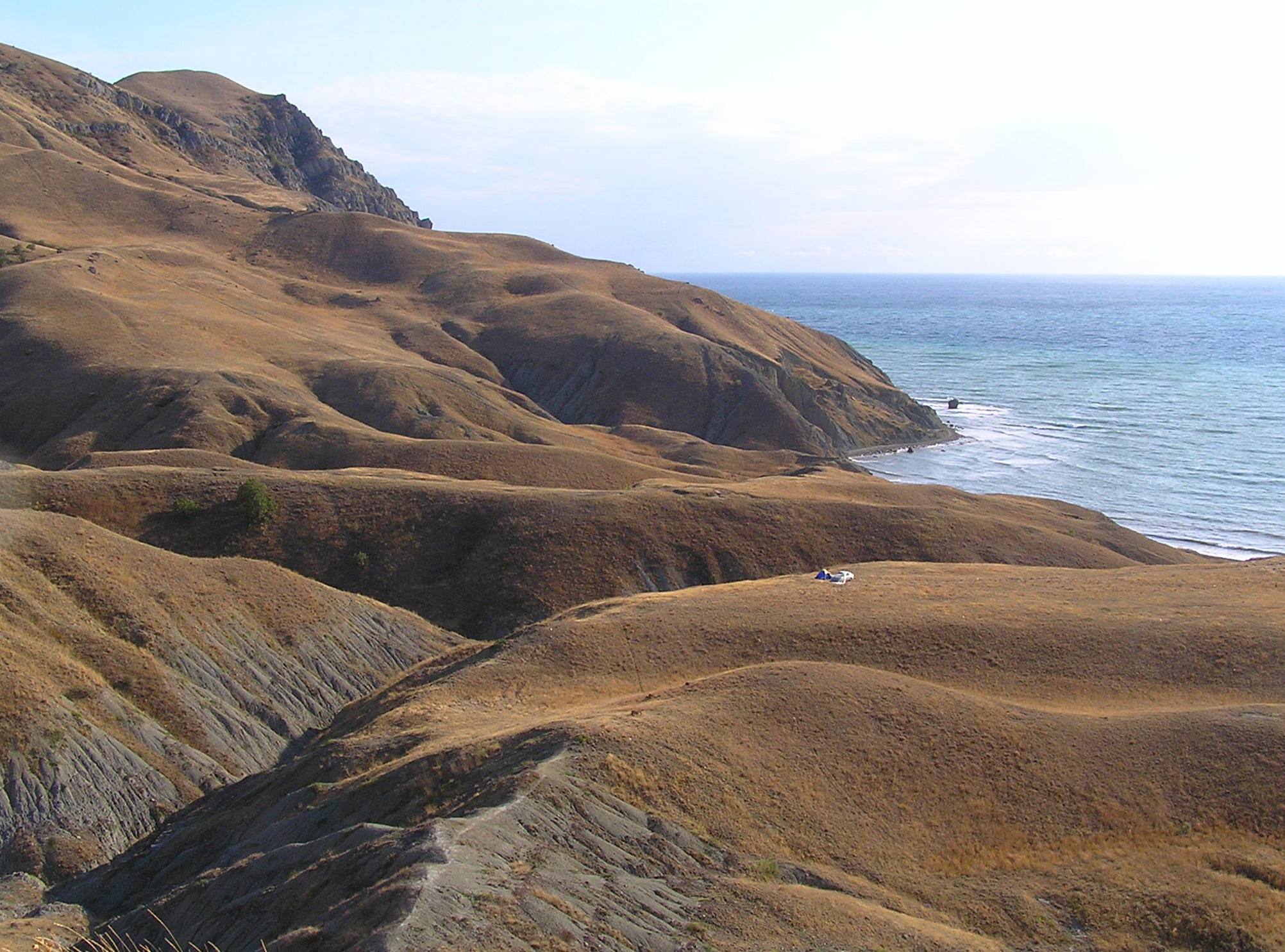 Пам'ятка природи «Півострів Меганом», м. Судак, с. Сонячна Долина.